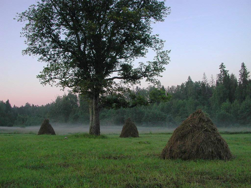 Усадьба Корфов (Санкт-Петербург и Лен.область, Волосово, деревня Раскулицы)